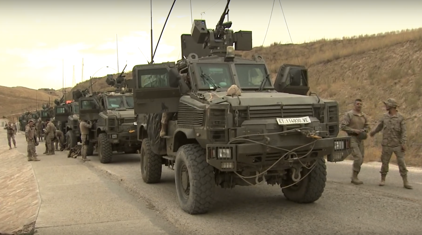 En breve nos iremos de Qala-i-Naw, una ciudad al oeste de la provincia afgana de Badghis, donde llegamos en 2005. Primero en un pequeño cuartel y, desde 2010, en la base 'Ruy González de Clavijo', han sido ocho años de esfuerzo y duro trabajo que culmina ahora tras meses de repliegue. Vehículos y material se han ido trasladando hacia Herat para su repatriación a España. Son convoyes que salen de Qala-i-Naw y deben recorrer 150 km. por la ruta 'Lapis', un itinerario en el que invierten entre 12 y 16 horas por las precarias condiciones. Entre las dificultades está el temido paso de Sabzak, a 2.500 metros de altitud, un tortuoso camino de tierra que bordea un desfiladero donde opera la insurgencia. Para culminar con éxito el trayecto, es imprescindible extremar las medidas de seguridad. Los helicópteros 'Tigre', 'Cougar' y 'Chinook' constituyen un grupo táctico para el reconocimiento, escolta y apoyo a los convoyes. Las columnas van encabezadas por vehículos antiminas 'Husky' que las protegen contra artefactos explosivos improvisados. Por su parte, los aviones no tripulados recorren la ruta para localizar posibles elementos adversos. Además, efectivos españoles y del Ejército afgano vigilan desde los puestos de observación preparados para posibles incidencias. Es, en definitiva, el mayor reto logístico al que se han enfrentado las Fuerzas Armadas españolas y se está superando con un rotundo éxito.